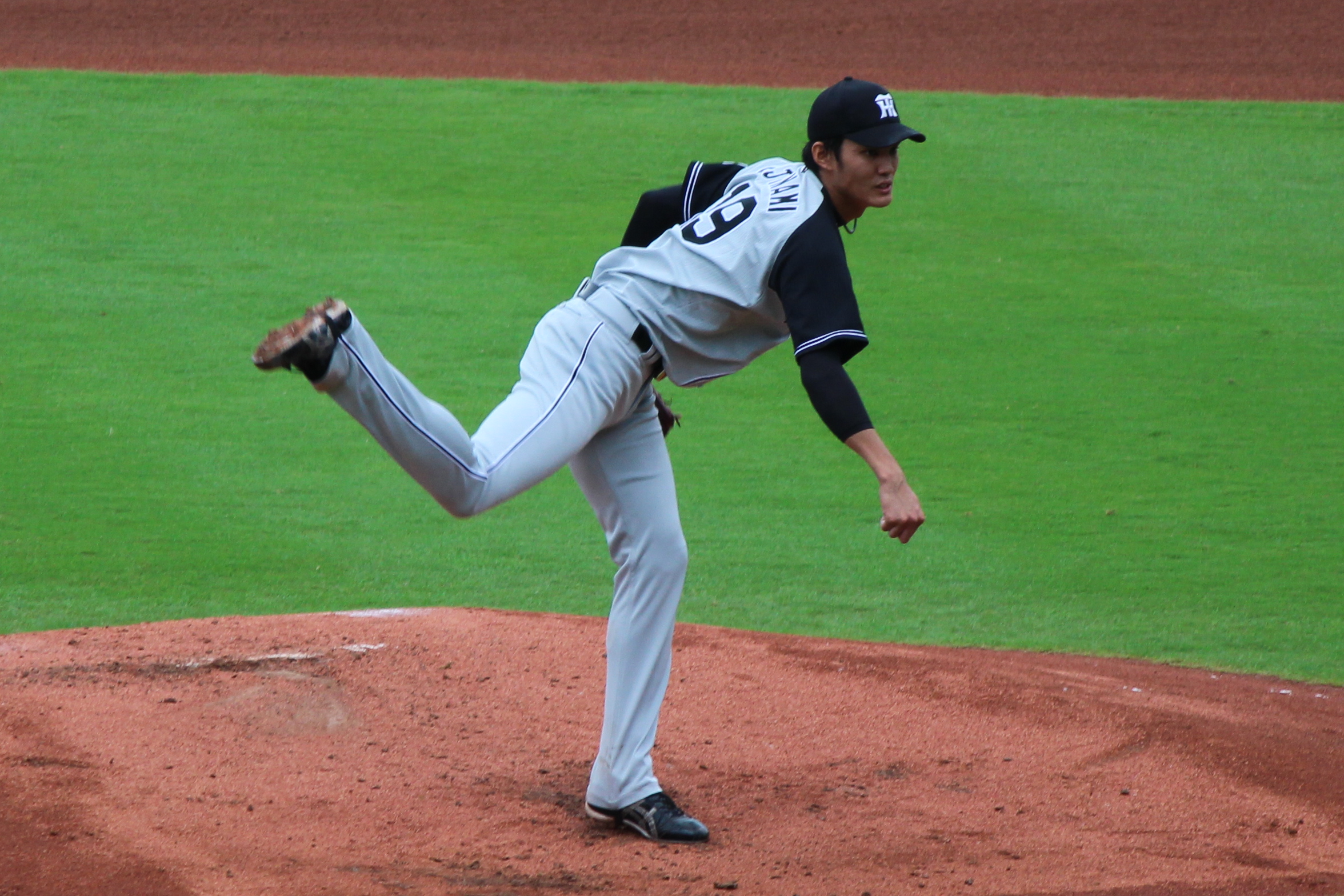 2016年9月22日、マツダスタジアムにて